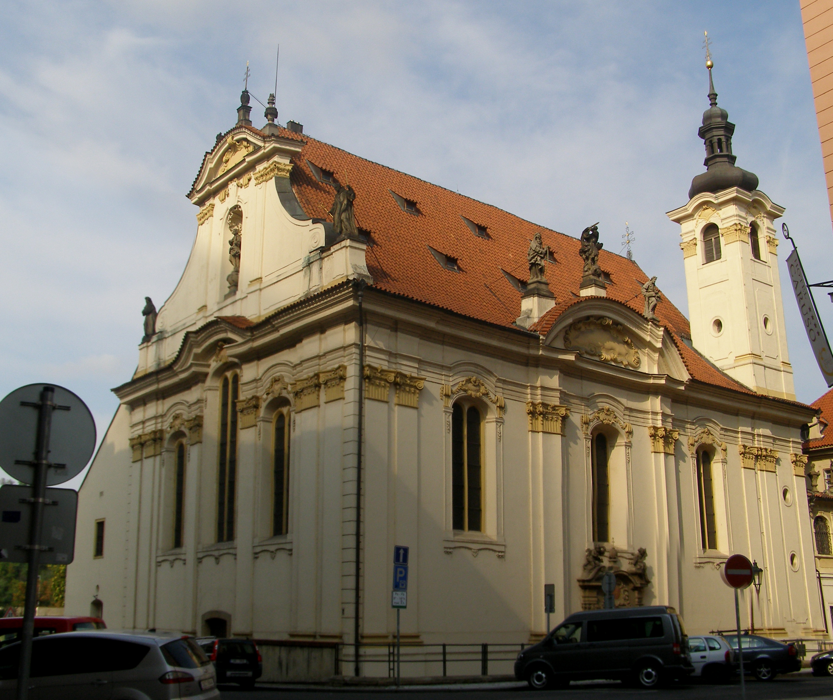 Klášter milosrdných bratří (Staré Město), Praha 1, U milosrdných 847/1, Staré Město